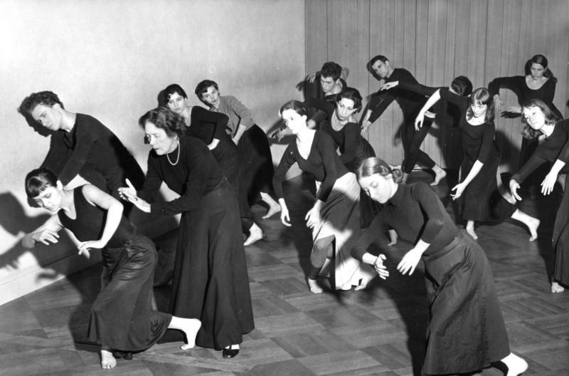 23.1.1959 West-Berlin, Mary Wigman-Studio vorn 3. von links: M. Wigman